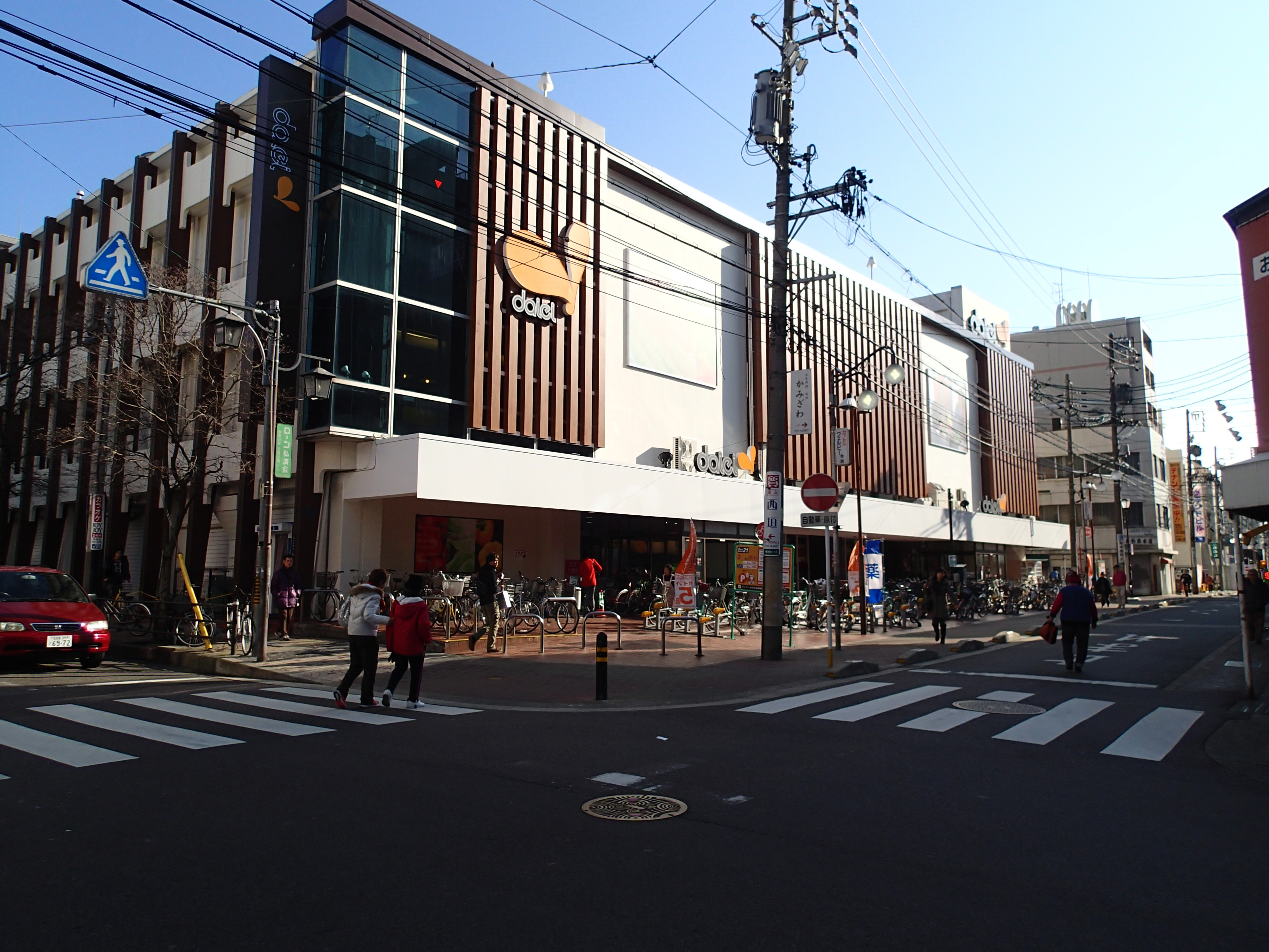 2014年1月26日撮影